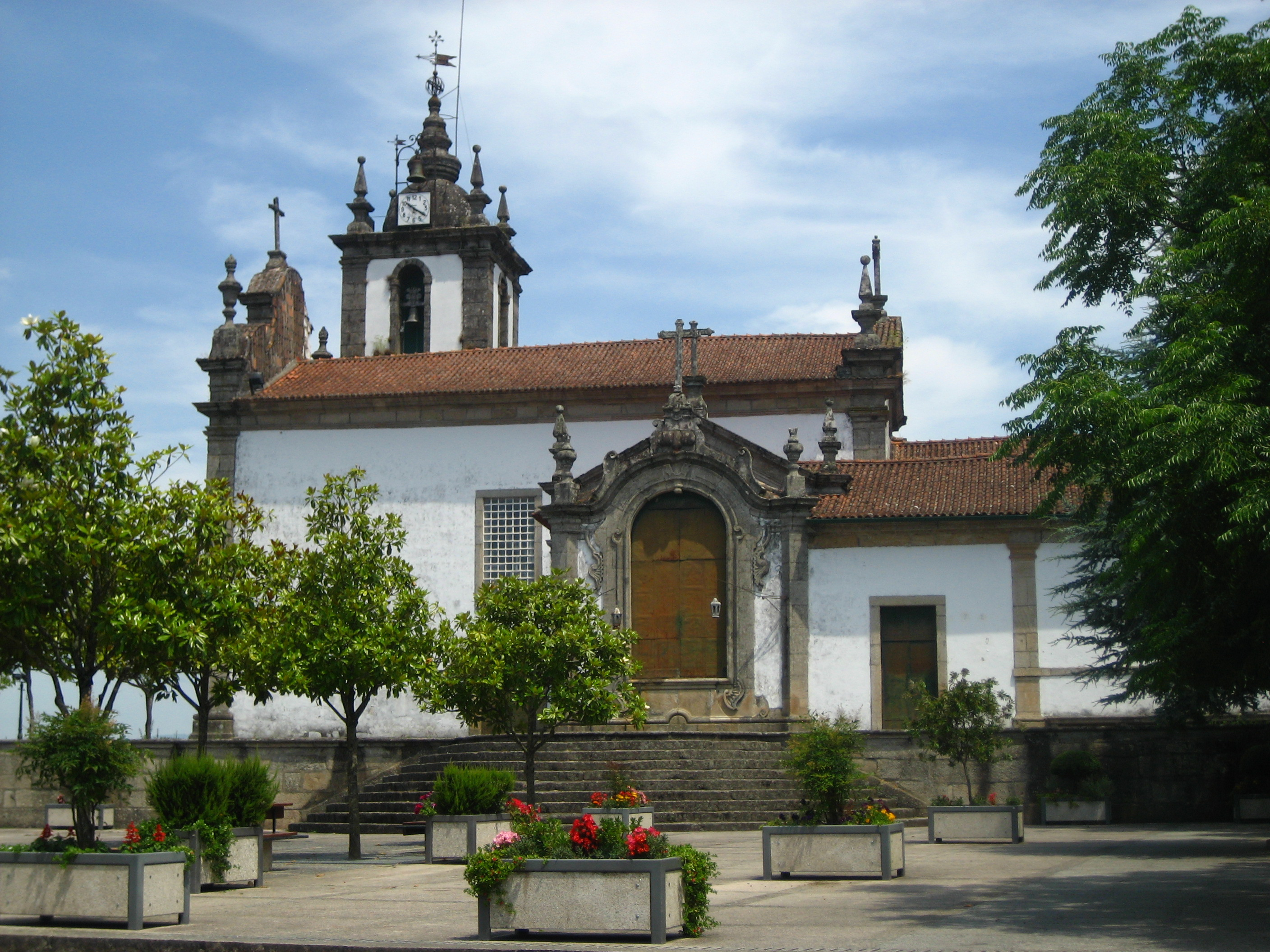 Igrega Matriz de Arcos de Valdevez, Arcos de Valdevez, Portugal